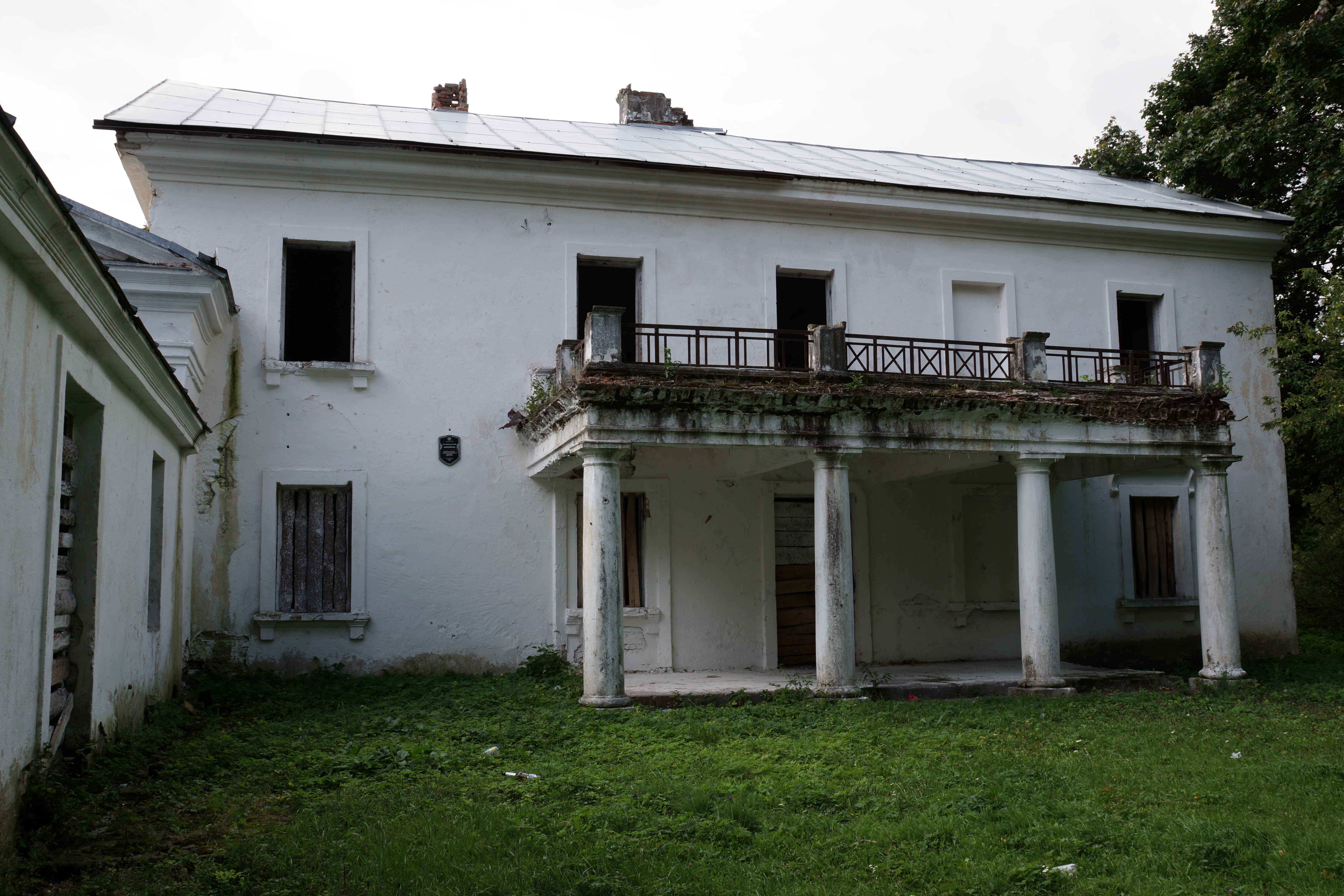 Беларуская (тарашкевіца): Фрагмэнты ансамбля былога палаца Храптовічаў:флігельвяндлярняпаркбібліятэка. в. Шчорсы This is a photo of Belarusian heritage monument. Reference number: 412Г000467 ( WLM)